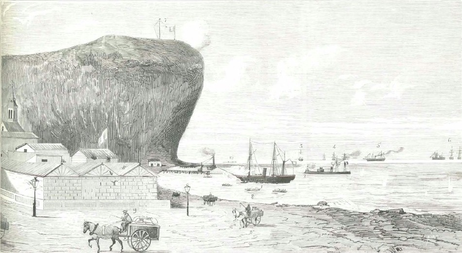 Guerra del pacifico. Arica (Perú), la corbeta union fuerza el bloqueo del puerto el 17 de marzo ultimo. 1 y 2 Union y Manco Capac (peruanos), 3 y 4 Huascar y transportes chilenos, 5 Lord Cocharne, 6 Buques neutrales, 7 Baterias del morro, 8 Lanchas desembarcando pertrechos, 9 Aduana, 10 Isla Alacrán.